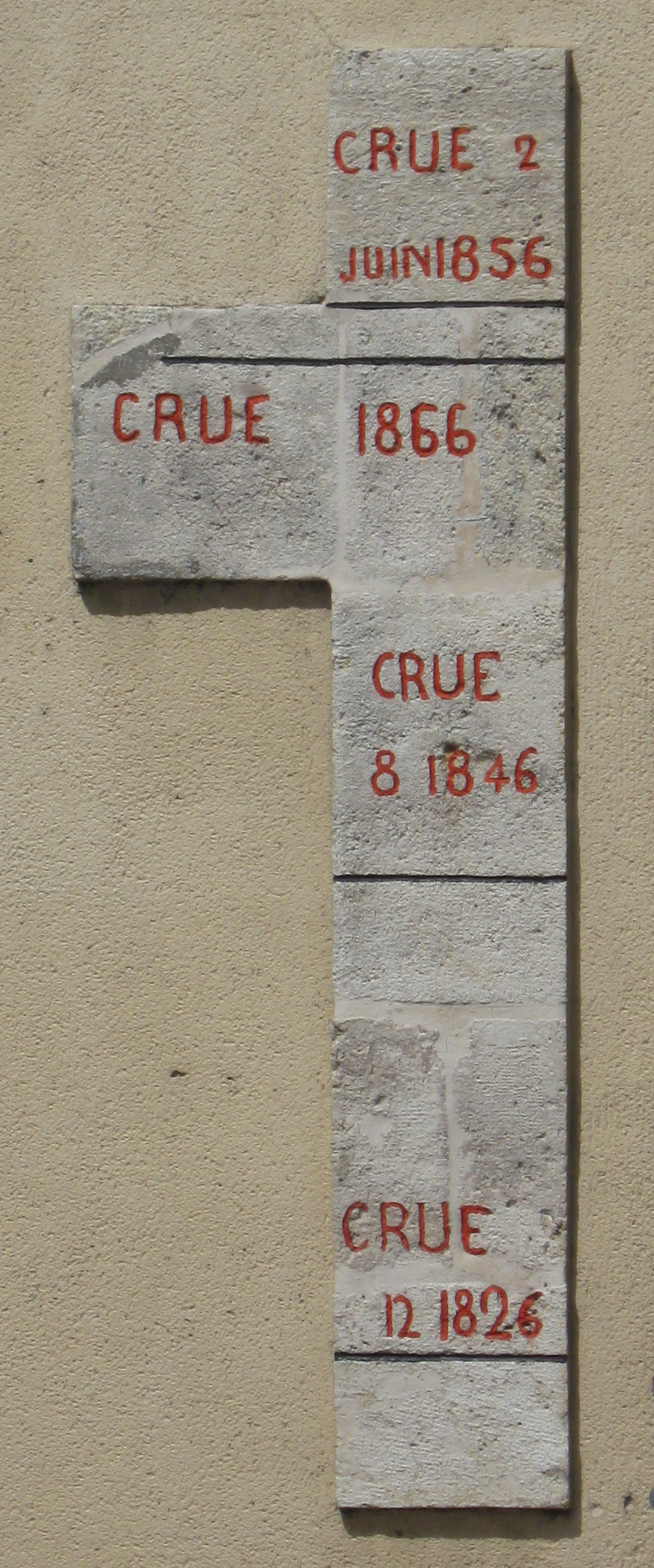 Repères de hauteurs de crues sur une maison des quais de Loire, Orléans, Loiret, France